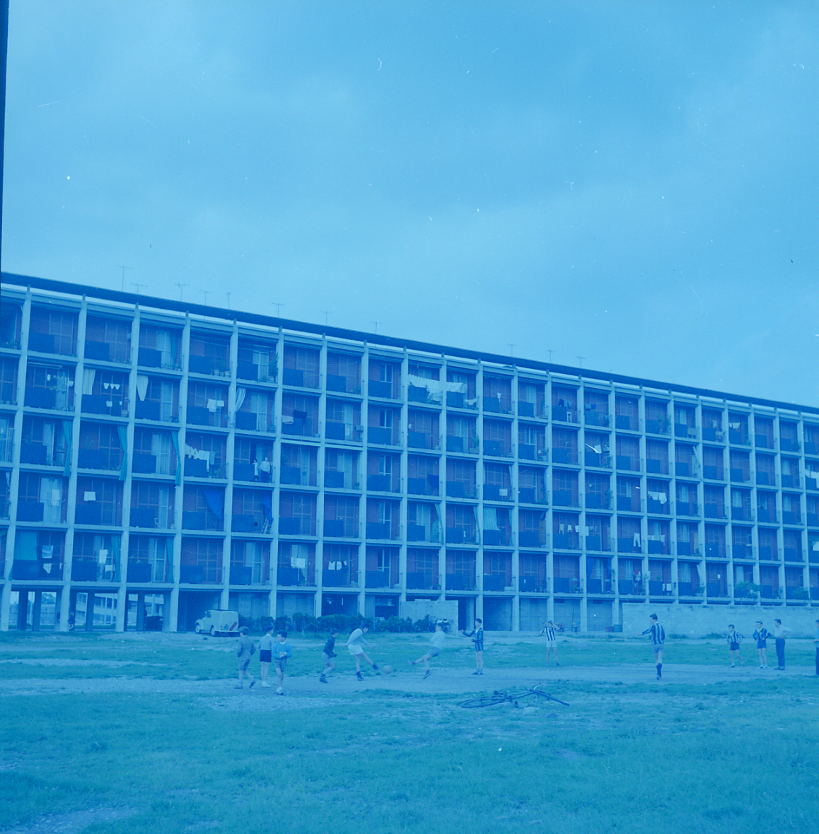 Serie fotografica : Milano, 1960 / Paolo Monti. - Buste: 6, Fototipi: 6 : Negativo colore, sviluppo cromogeno/ pellicola ; 6x6. - ((Serie costituita da 6 negativi identificati con i nn.: RCN3035-3040. Sulla busta del negativo RC3035N manoscritto: "Periferia Milano". La suddetta serie è contenuta nella scatola identificata con la numerazione RC2945N/3112N. Sul coperchio della scatola, manoscritto a pennarello: "Colore/N".